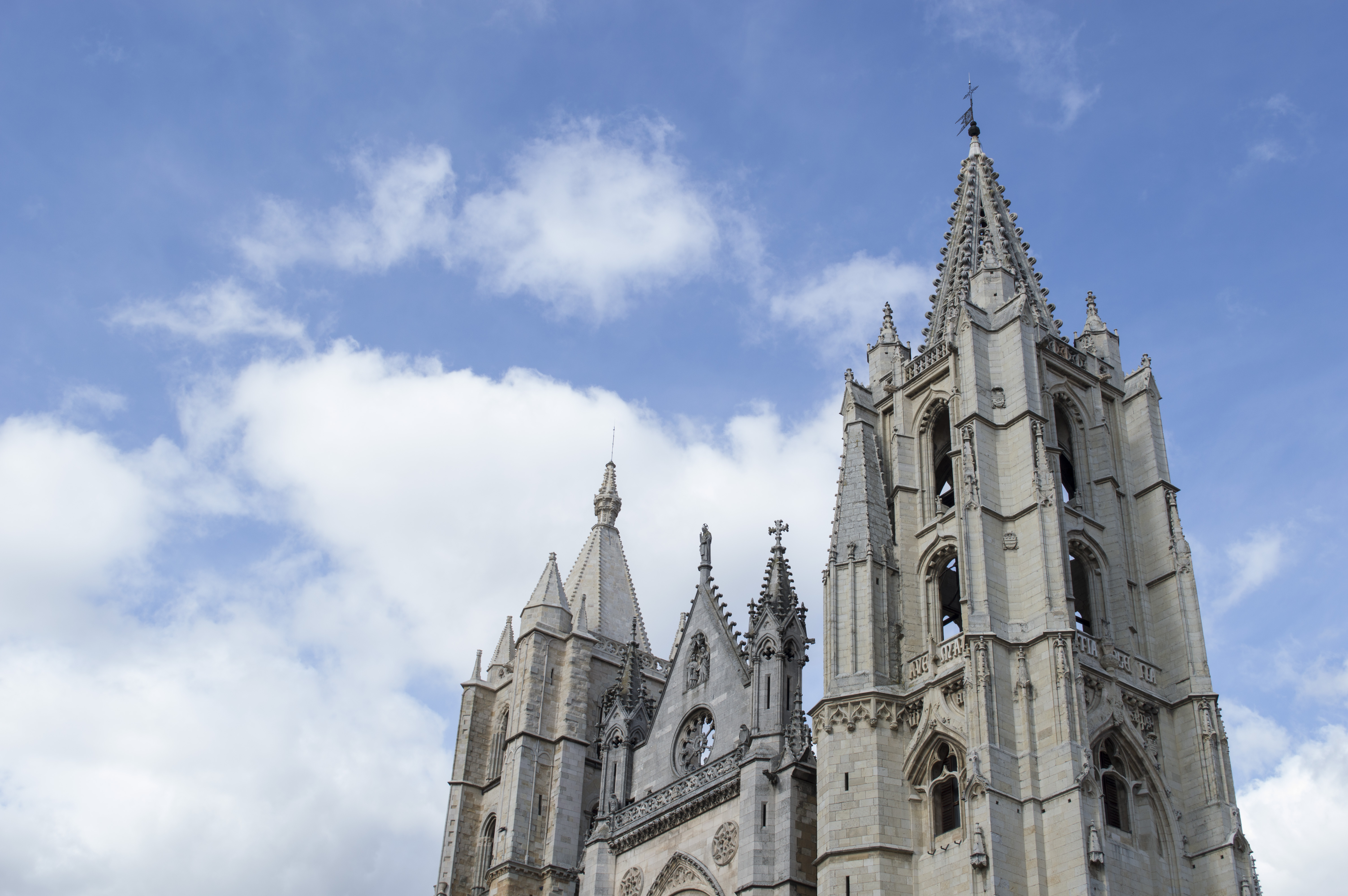 Catedral de LEon